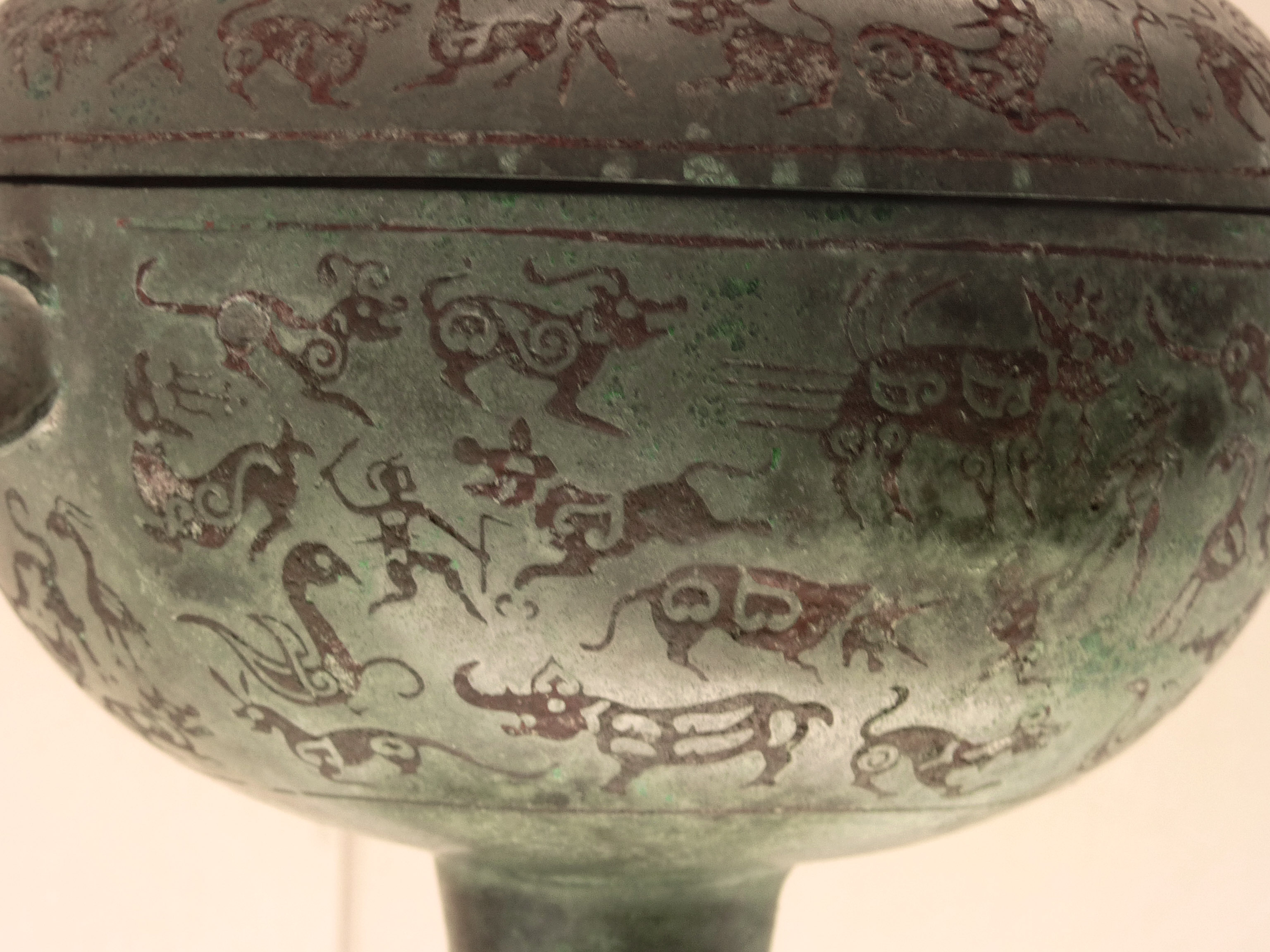 Vase dou pour les offrandes de céréales avec incrustations : scènes de chasse et animaux ( [Ici] «l'art animalier des steppes a joué un rôle non négligeable». Partie de droite sur l'image (centre de l'espace entre les deux anses) : un être hybride à tête d'animal, «vraisemblablement un thème légendaire» : Alain Thote, in Rites et festins de la Chine antique, Paris, Musée Cernuschi, 1998. Page 158).. H. 20,7 cm. Début Ve siècle avant notre ère ( fin de la période des Printemps et Automnes). Exhumé à Liyucun, Hunyuan, Shanxi en 1923.